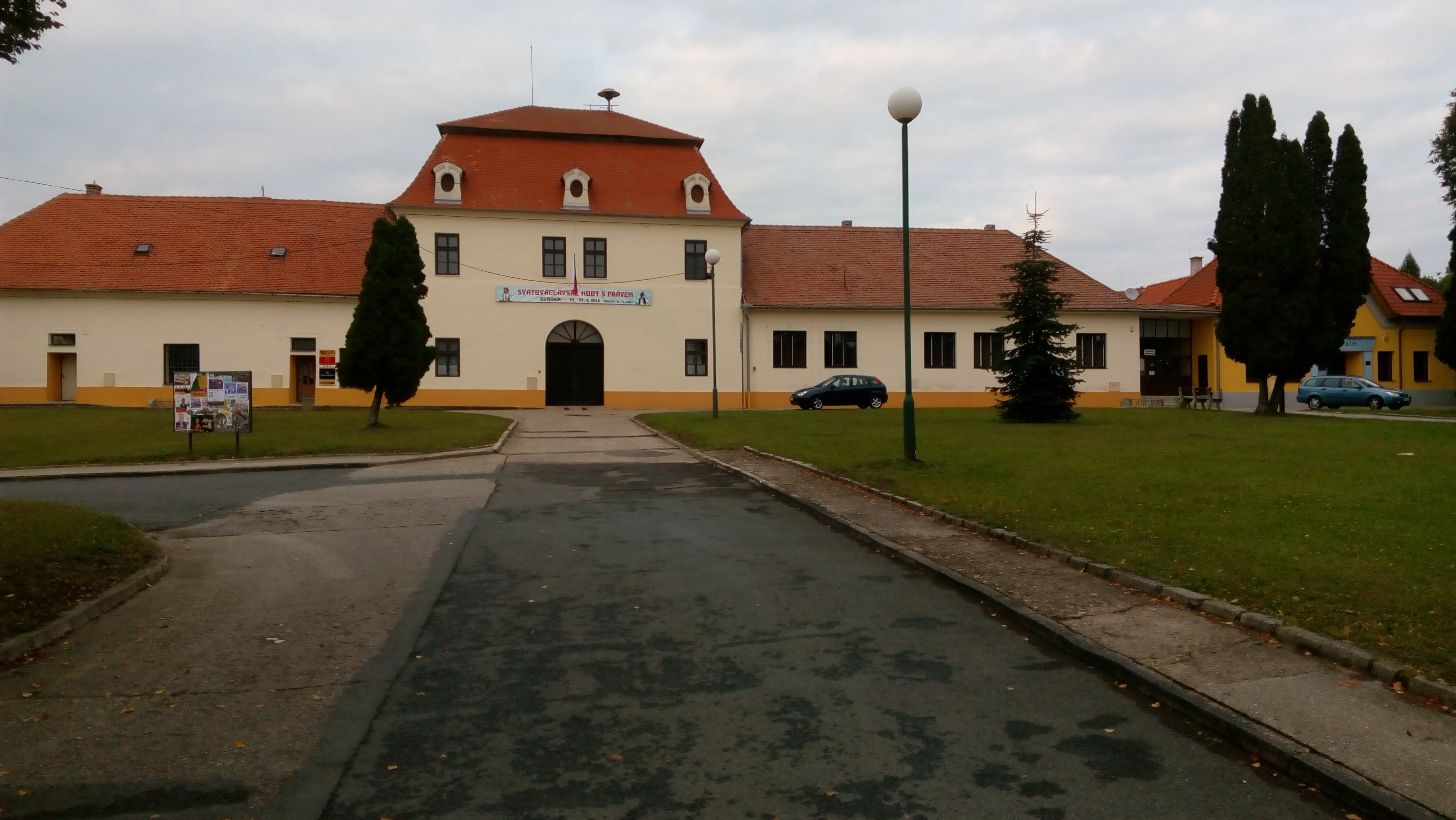 Domanínský dvůr je trojkřídlá stavba bývalého panského dvora s mansardovou střechou v centru obce z let 1672–1678. Dnes slouží jako Obecní úřad.